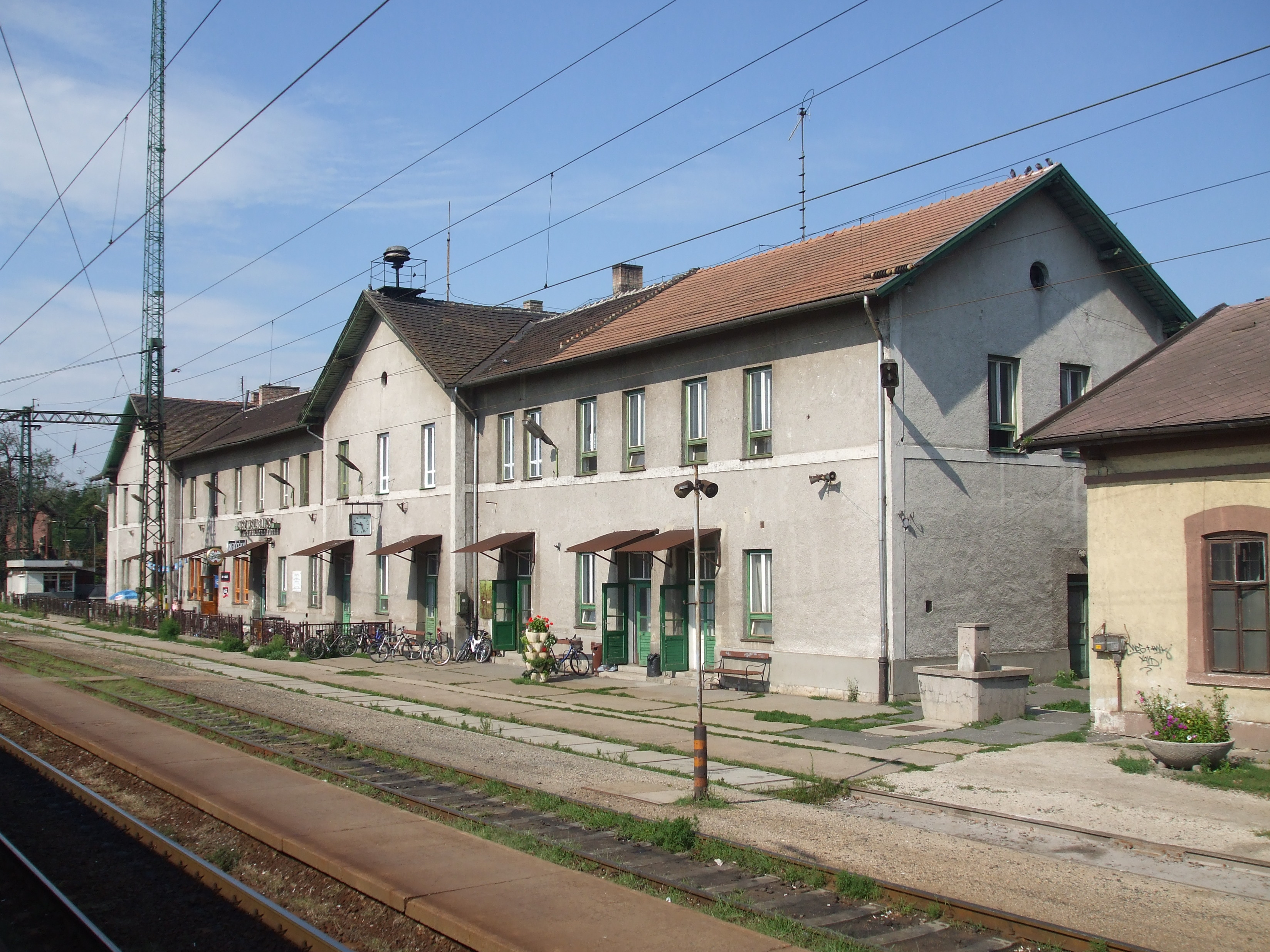 Pusztaszabolcs vasútállomás felvételi épülete.